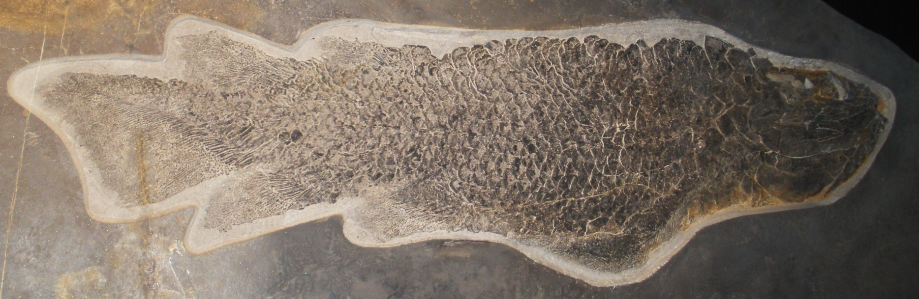 Fossil of Glyptolepis, an extinct fish- Took the photo at Fossil Show, Munchen 2011